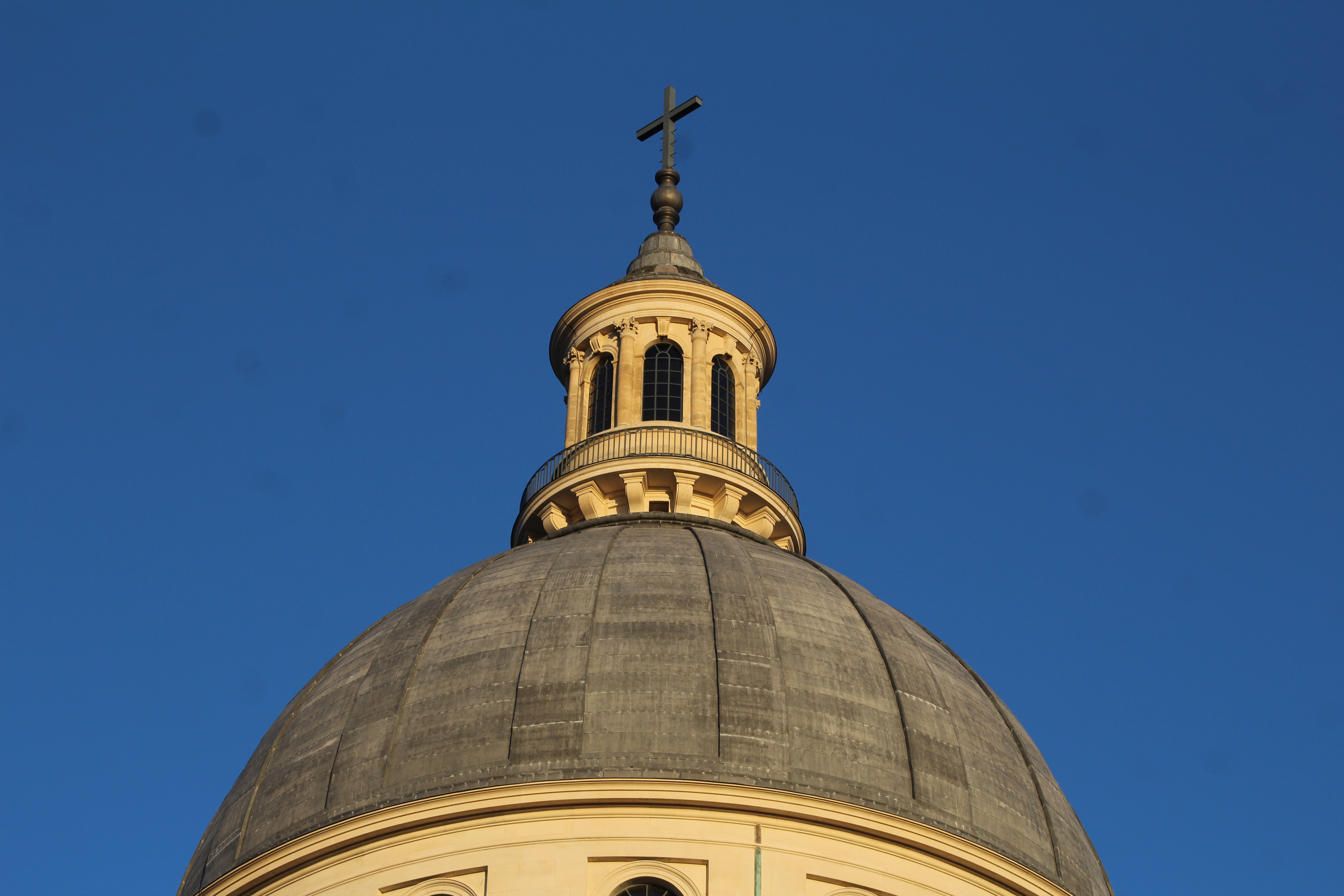 Dôme du Panthéon, Paris.